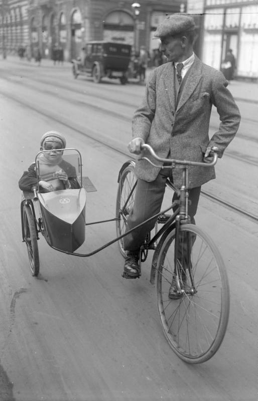 Das Fahrrad mit Beiwagen! Das Fahrrad mit Beiwagen, eine praktische Neuheit zum Mitnehmen von Kindern bei Ausflügen, in den Strassen Berlins